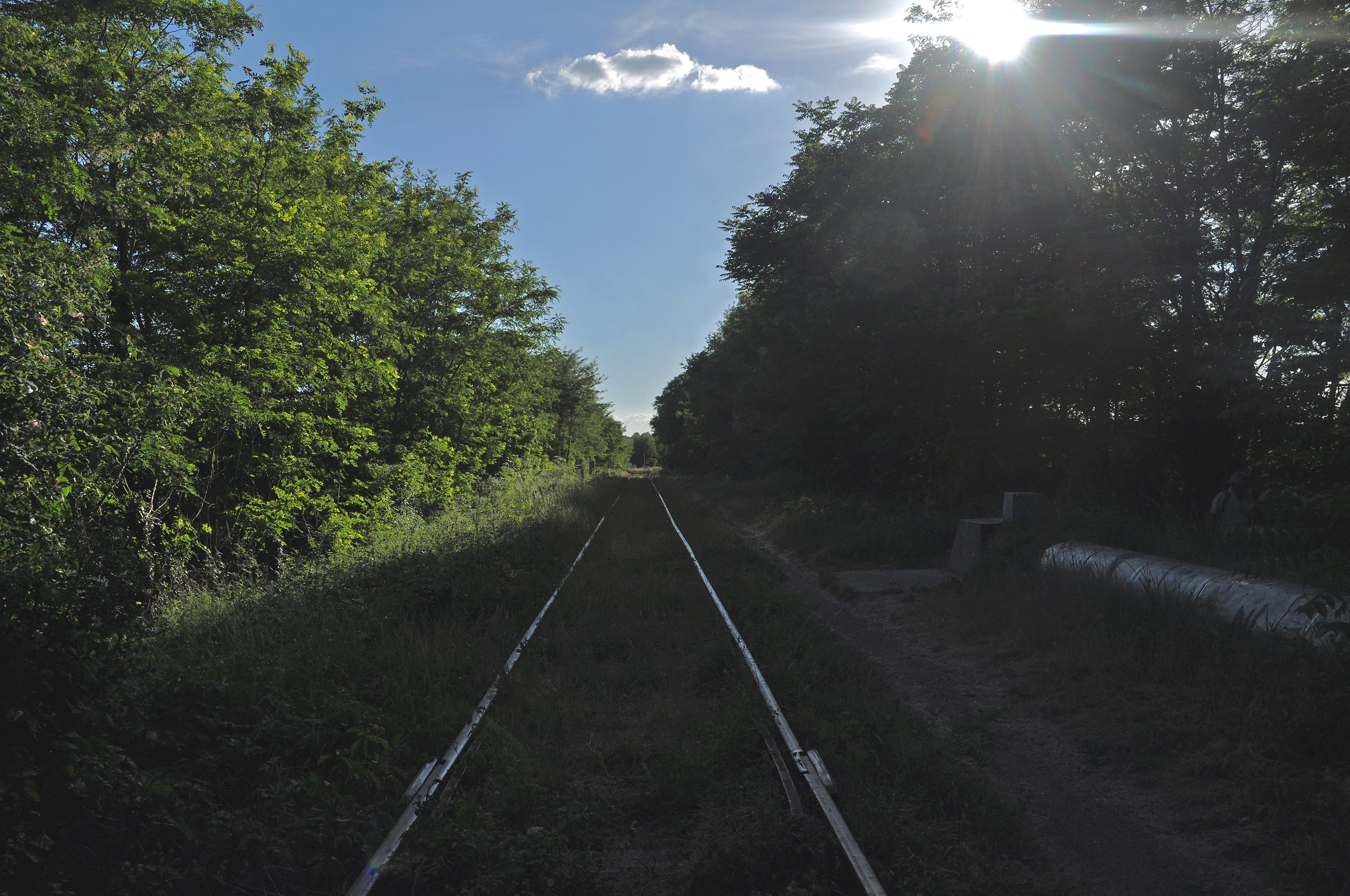 Cette ancienne voie menait de Moulins à Montluçon. Cette photo est prise juste sur la rive OUEST de L 'ALLIER. Donc rive gauche,en sortie de tablier du pont.